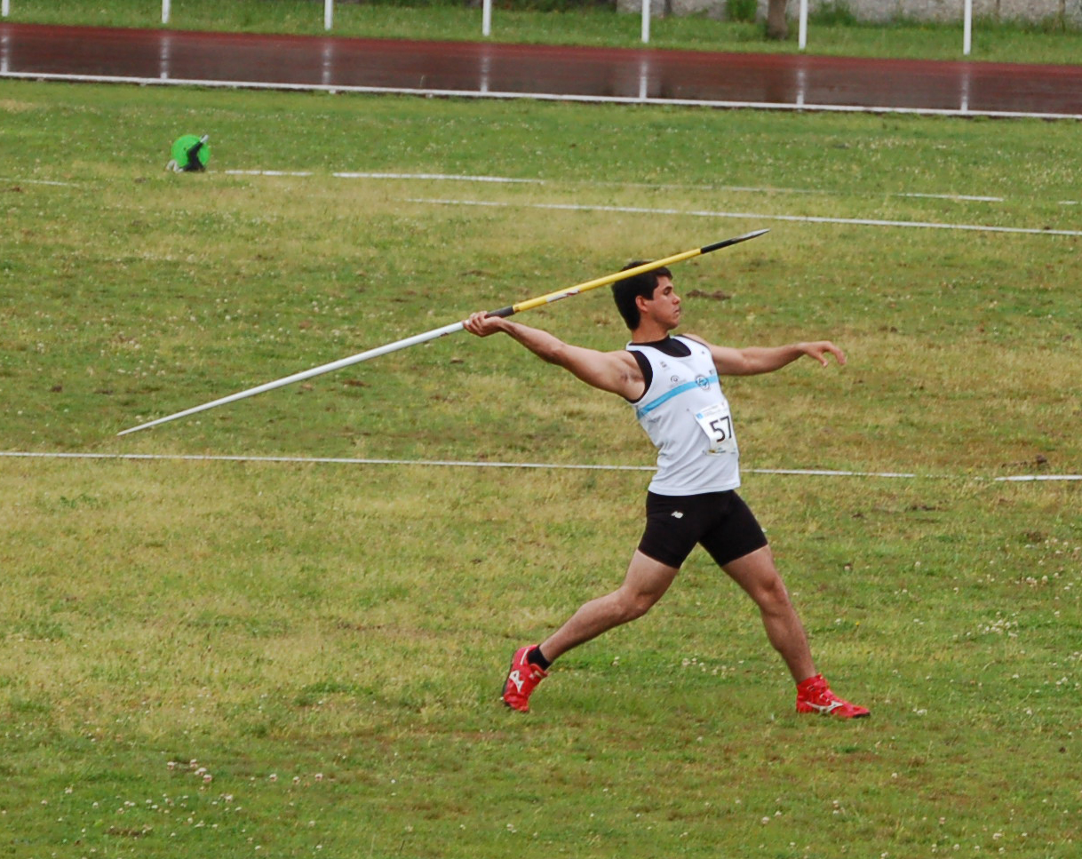 Gustavo Dacal, lanzador de xavelina, no Centro Galego de Tecnificación Deportiva de Pontevedra, quecendo no XXXVII trofeo Boa Vila, organizado pola Sociedad Gimnástica de Pontevedra